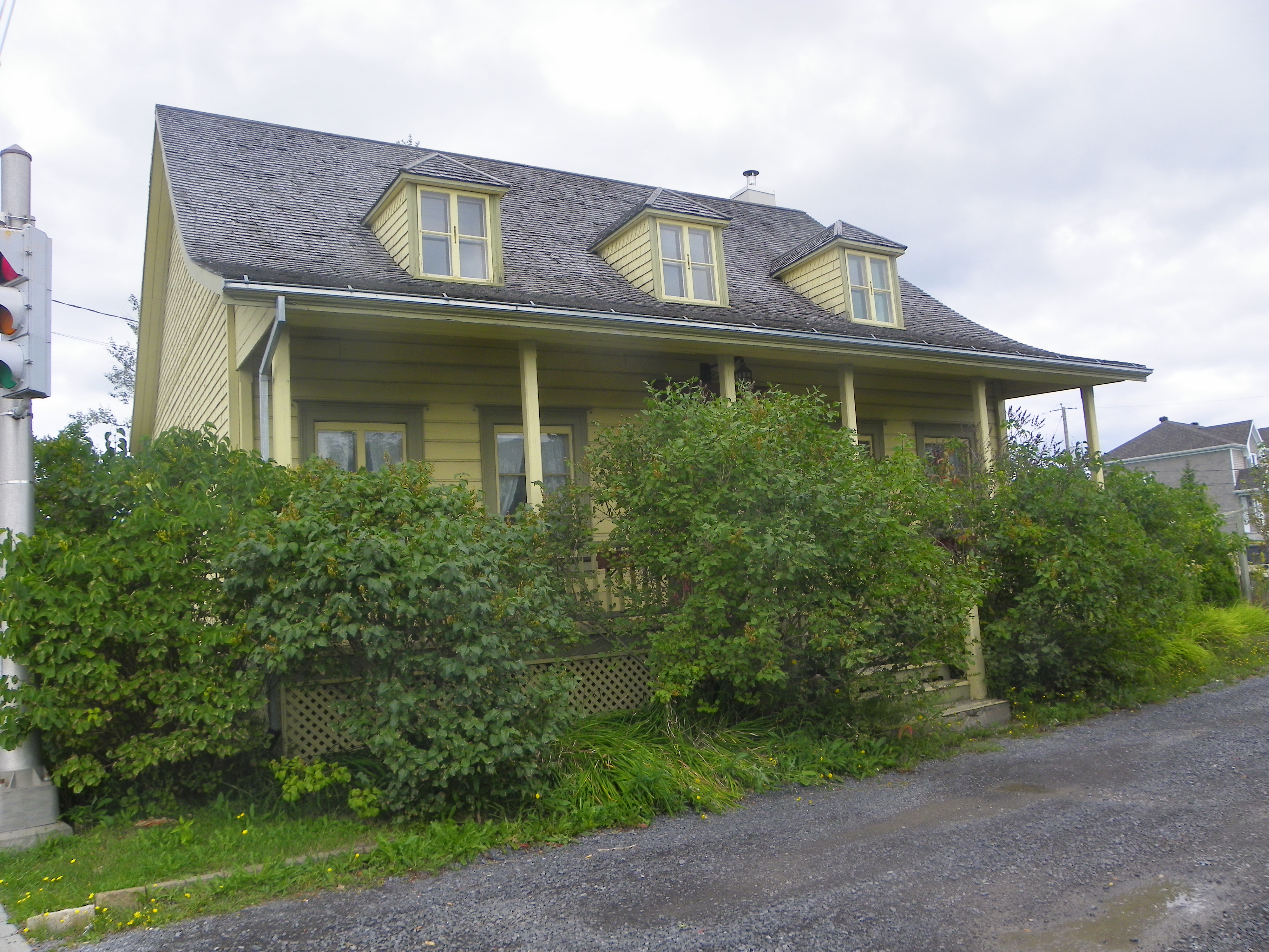 Vue de la maison à partir de la rue